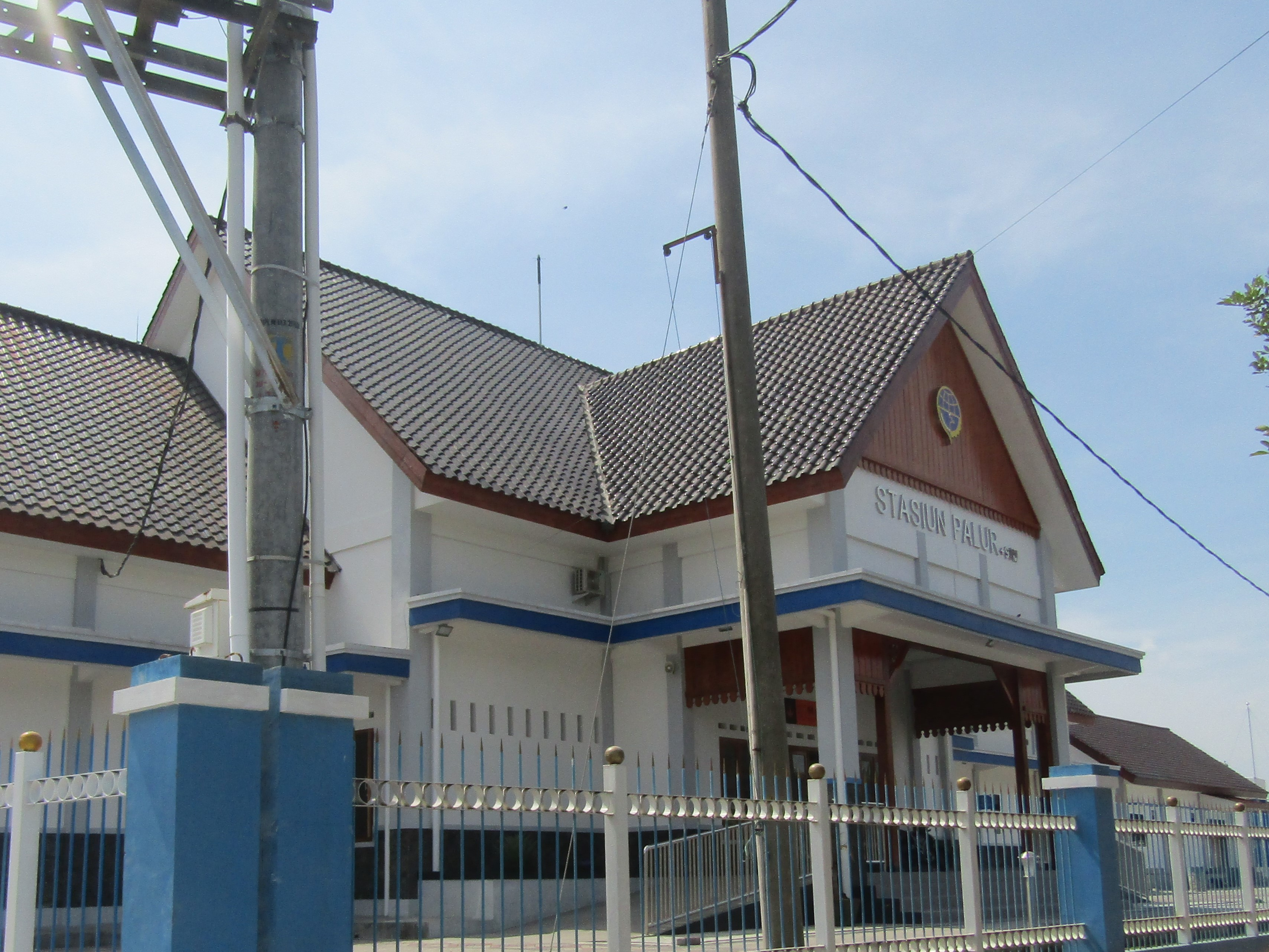 Tampak perspektif Stasiun Palur baru. Bangunan lama sudah dirobohkan.